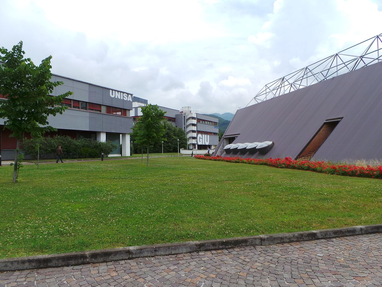 Aule di giurisprudenza UNISA